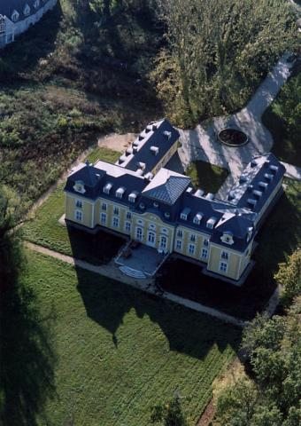 Rábasebes, Hungary, aerialphotography